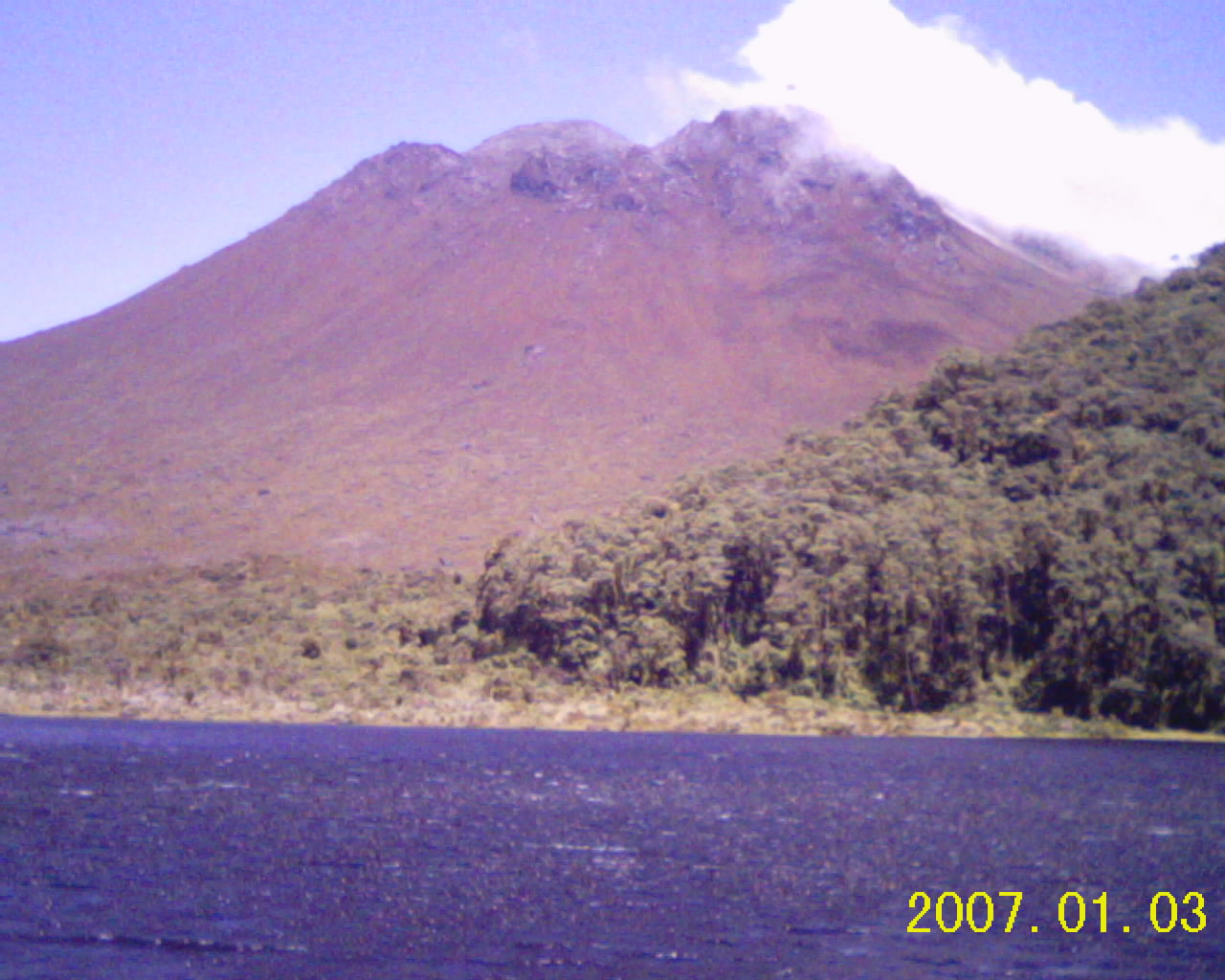 volcan y laguna del silencio